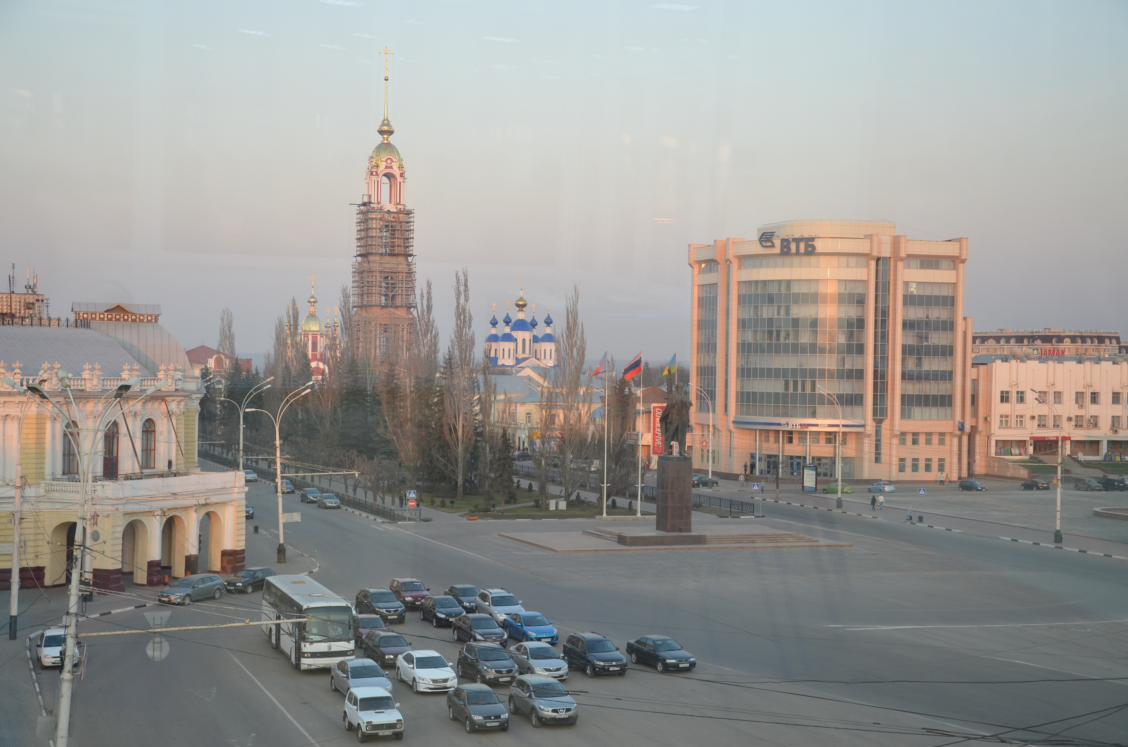 Дворянское собрание. Здесь размещались первые губернские комитеты РКП (б) и РКСМ; с балкона этого здания выступал Калинин М. И. (Тамбовская область, Тамбов, Интернациональная улица, 15)